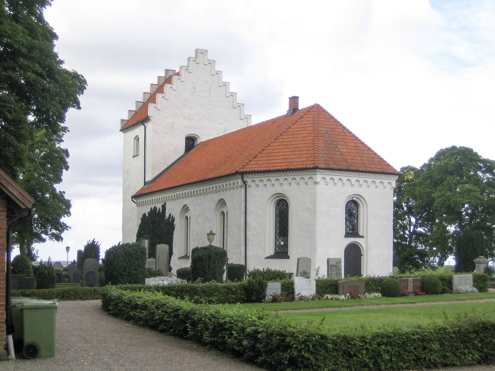 Svenstorp kyrka, Skivarps församling. Bilden tagen av mig själv 28 augusti 2005.